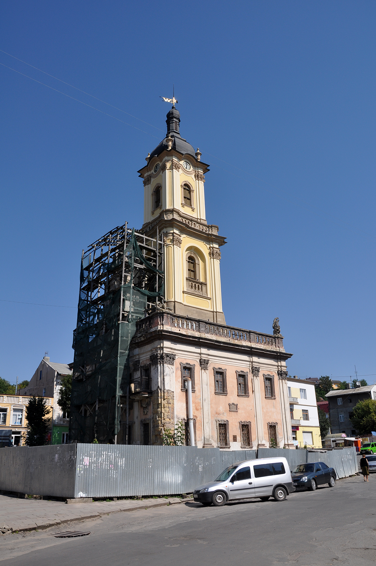 Ратуша (мур.), Бучач, майдан Волі